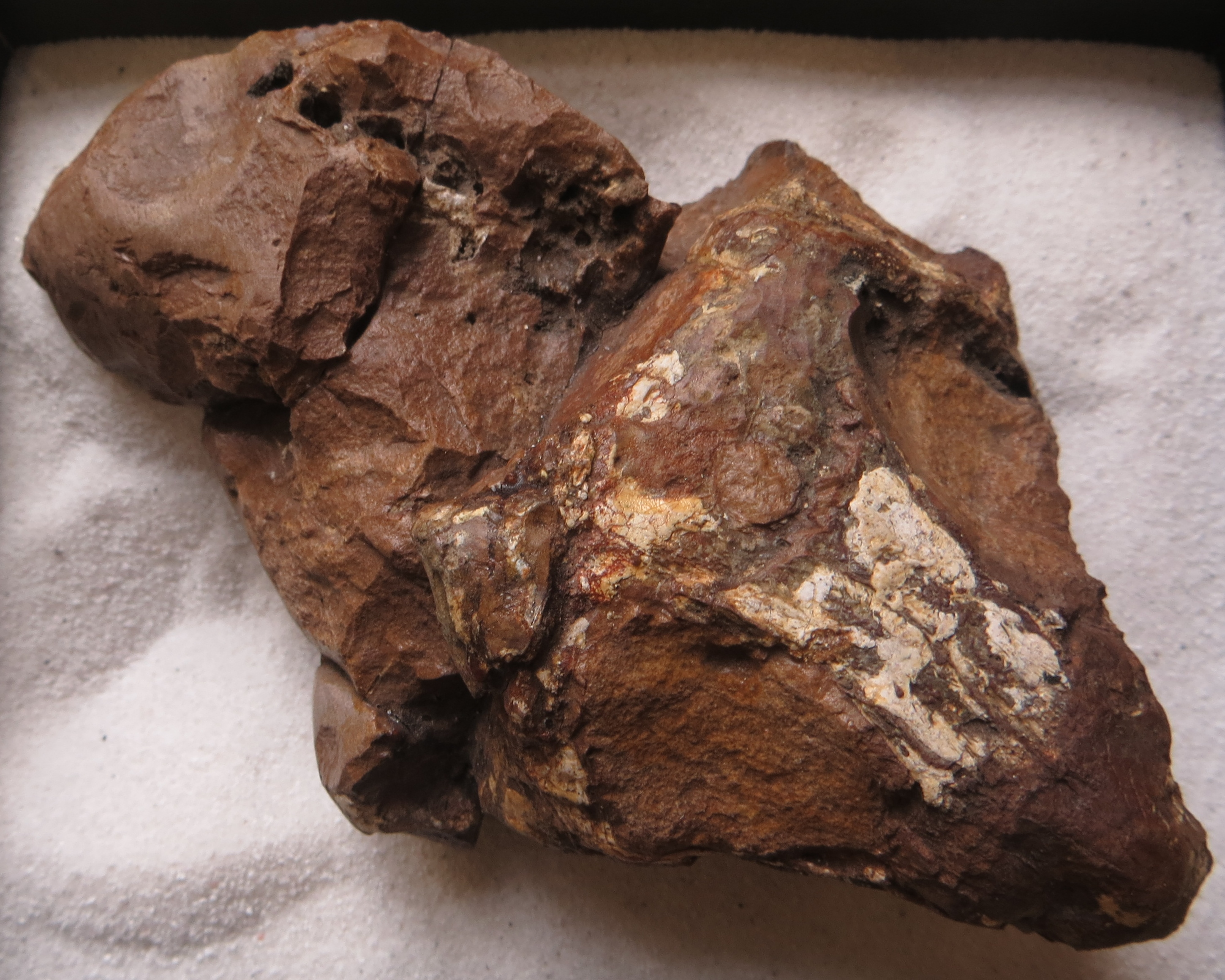 Fossil of Procolophon - Took the picture at Natural History Museum, Bonn University